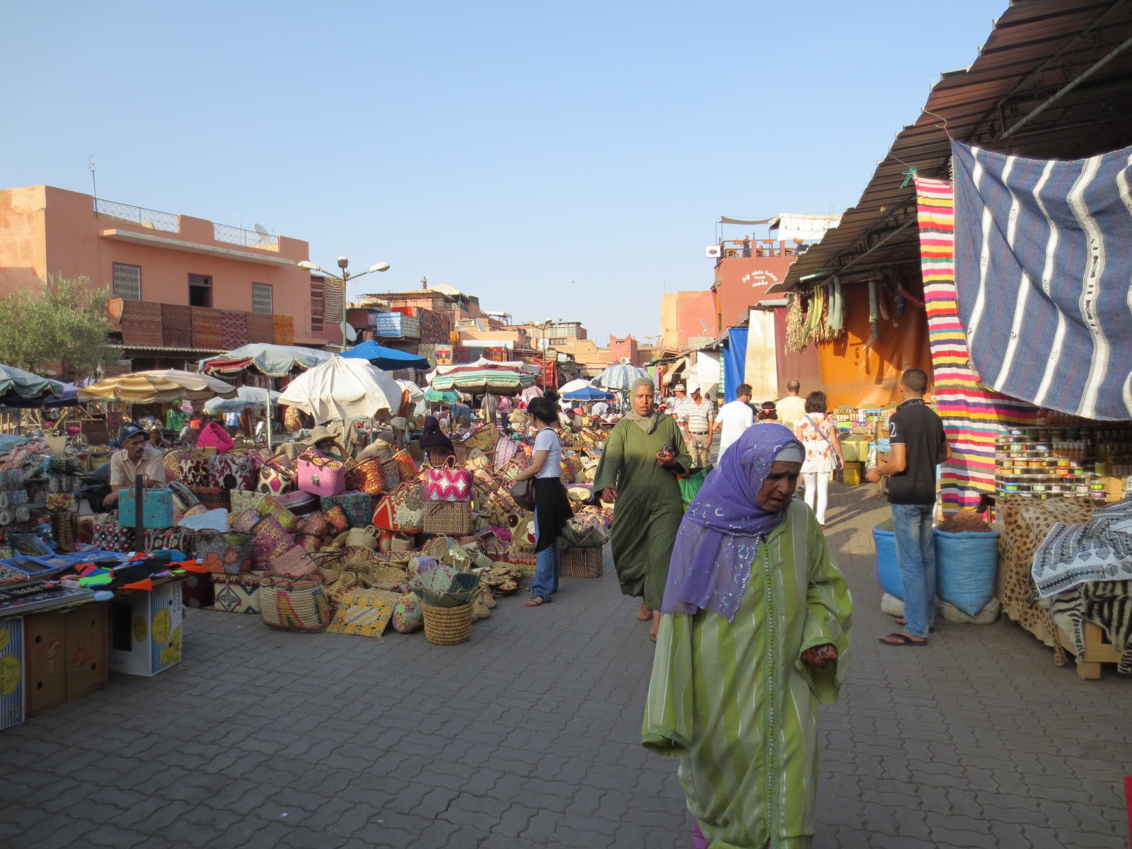 Souqs of Marrakech